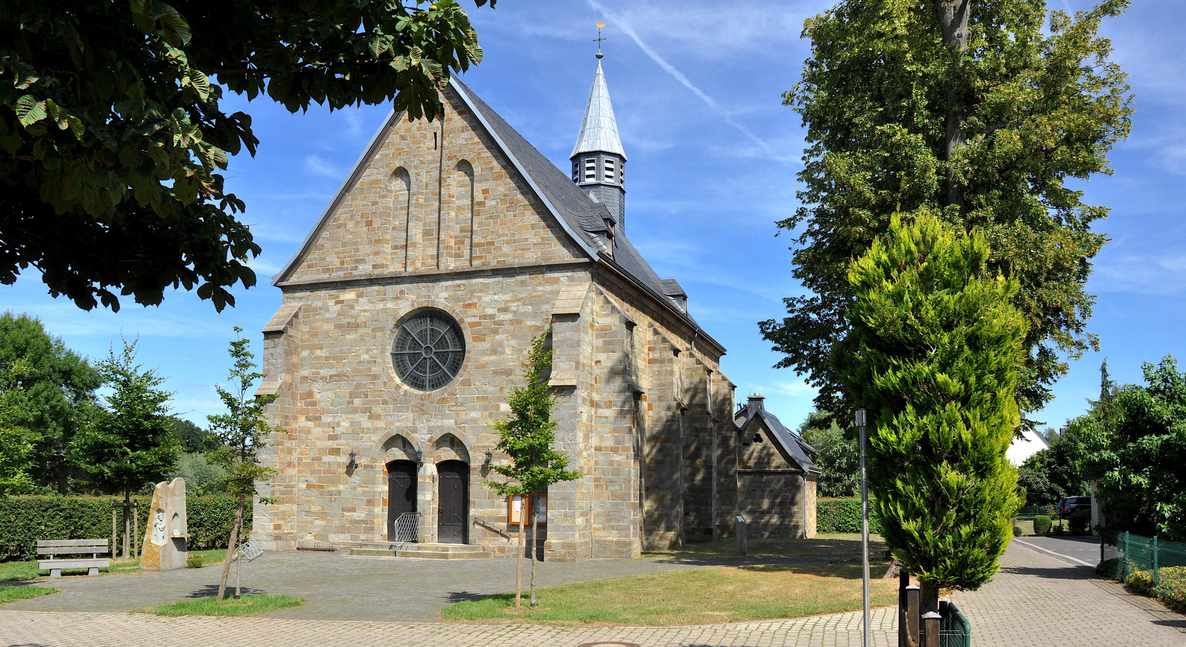 Kapelle Ehringhausen, Baudenkmal in Geseke Nr. 149This is a photograph of an architectural monument., no. 149